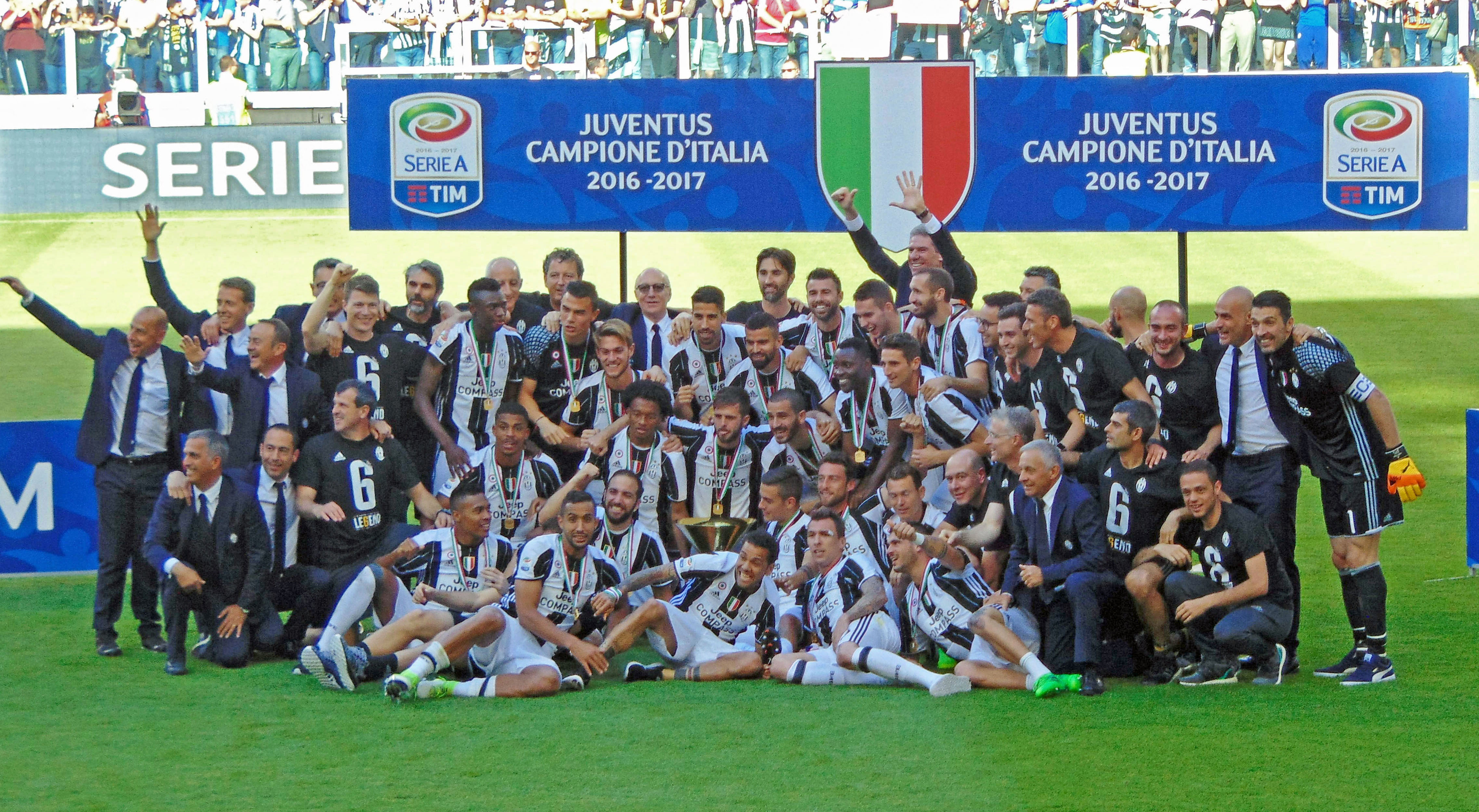 Torino, Juventus Stadium, 21 maggio 2017. Al termine della vittoriosa sfida interna contro il Crotone (3-0), la Juventus festeggia la conquista del 33° scudetto nonché 6° consecutivo — quest'ultimo un record nella storia del campionato italiano di Serie A e dei maggiori campionati nazionali d'Europa.